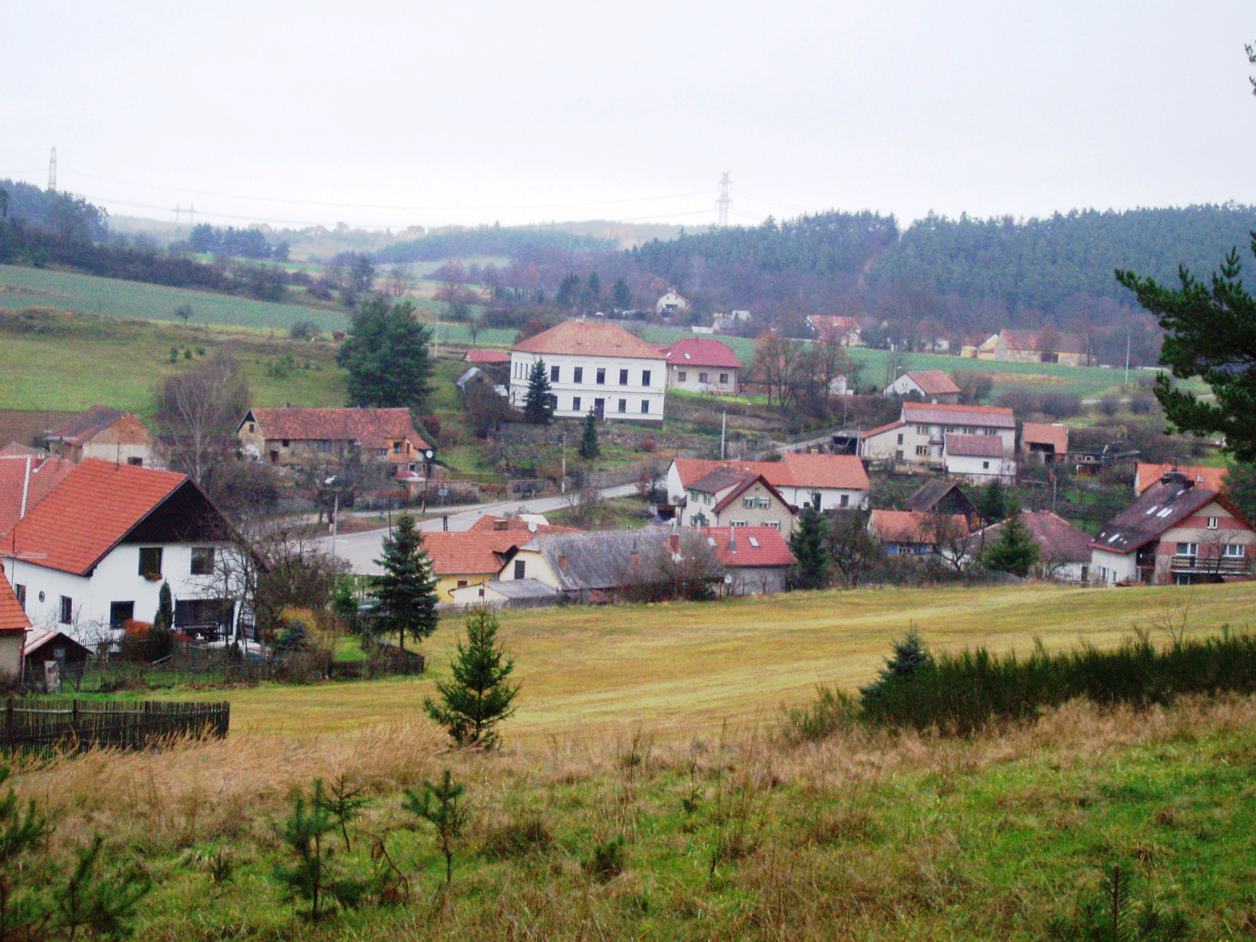 Obory - celkový pohled